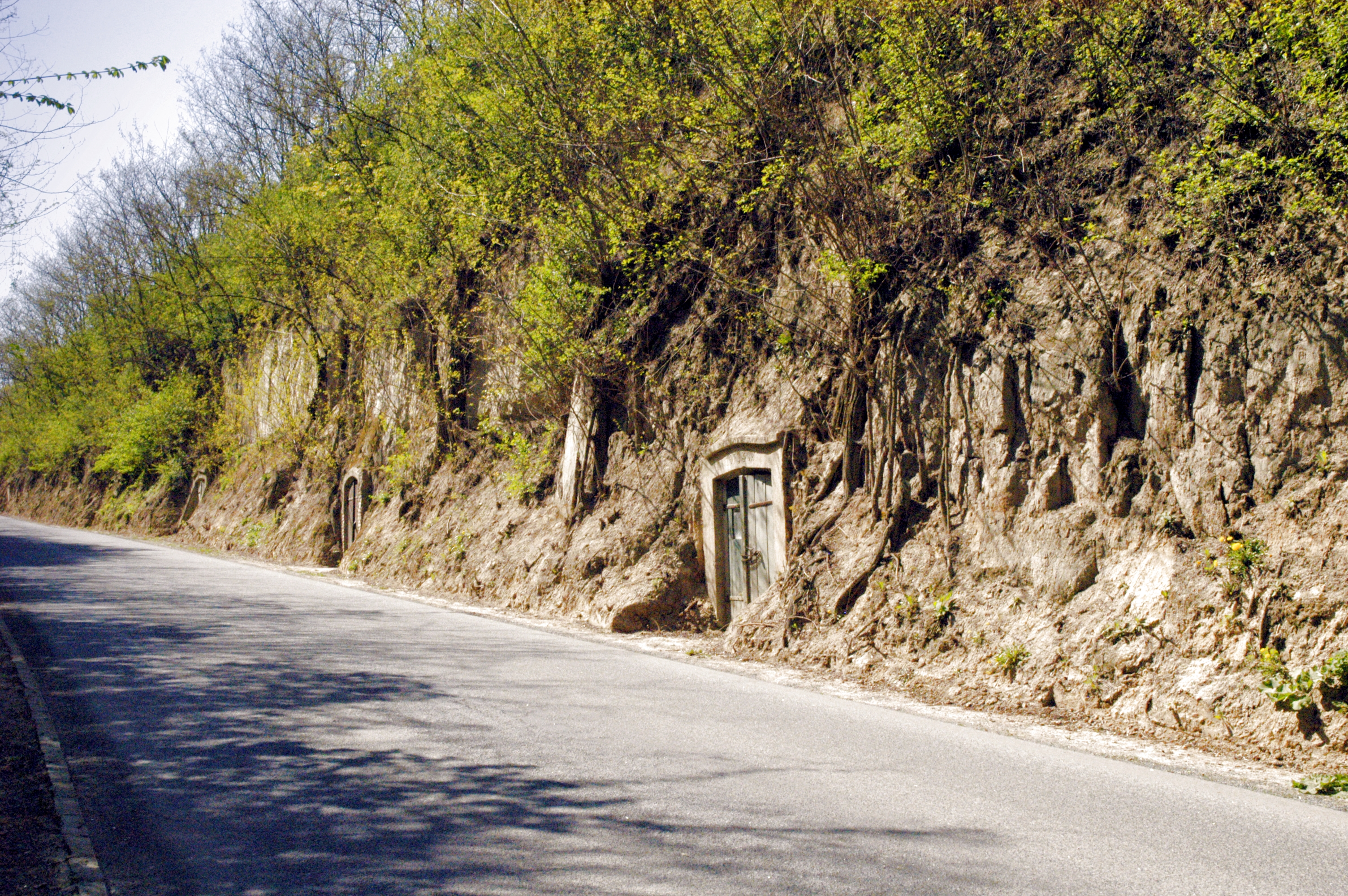 Kellereingänge am Wagram bei Ruppersthal